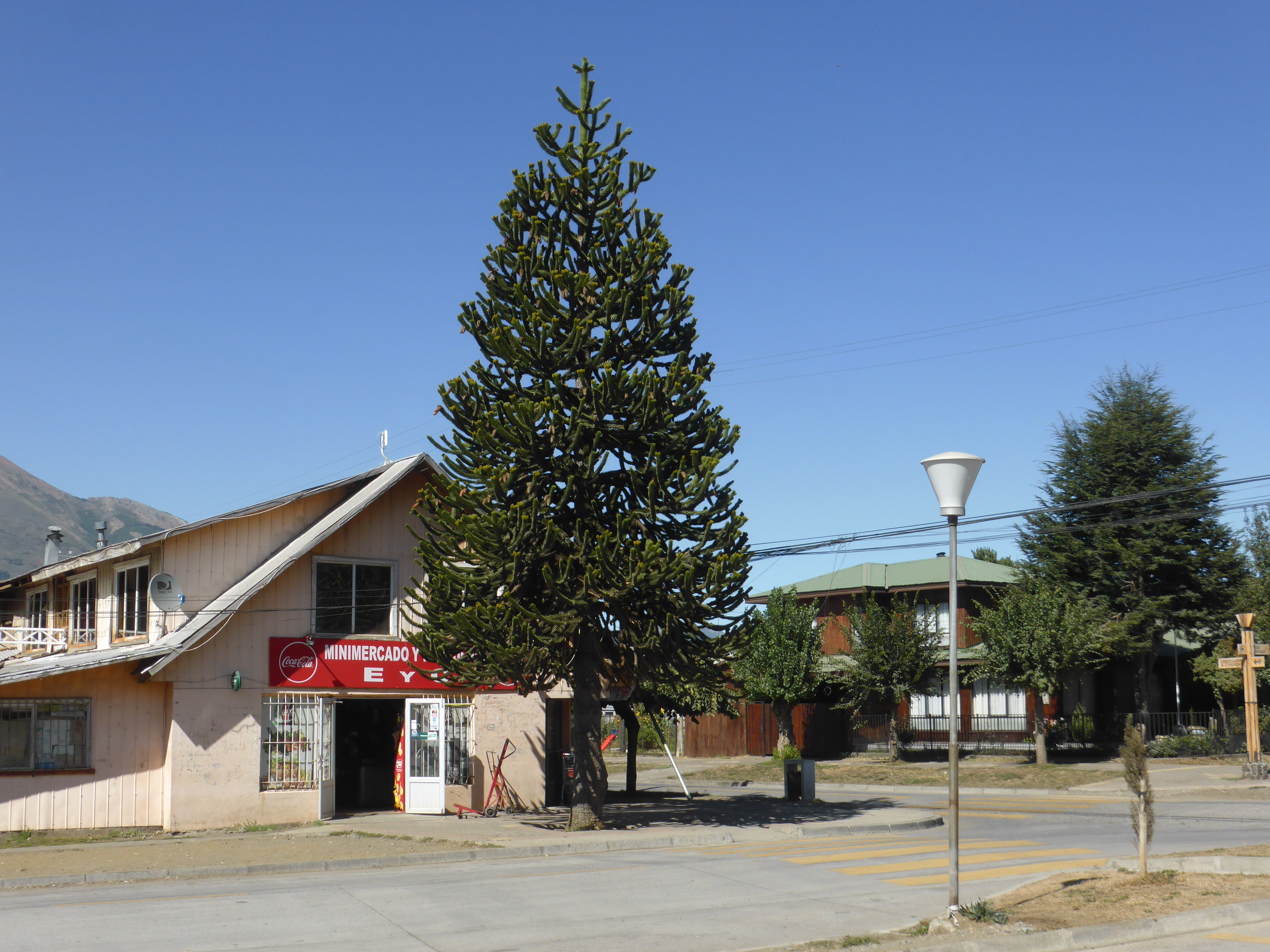 Calle Portales esquina con O'Higgins, en la localidad de Lonquimay. Región de La Araucanía.